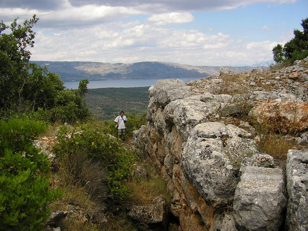 Purkin Kuk, Dol na Hvaru, arheolosko nalaziste